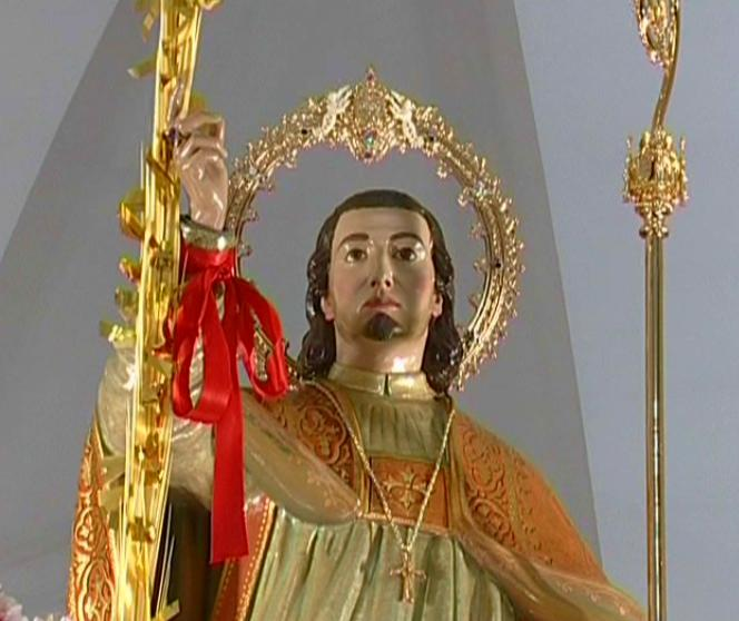 Imagen de San Blas, que se encuentra en la localidad de Sax (Alicante).